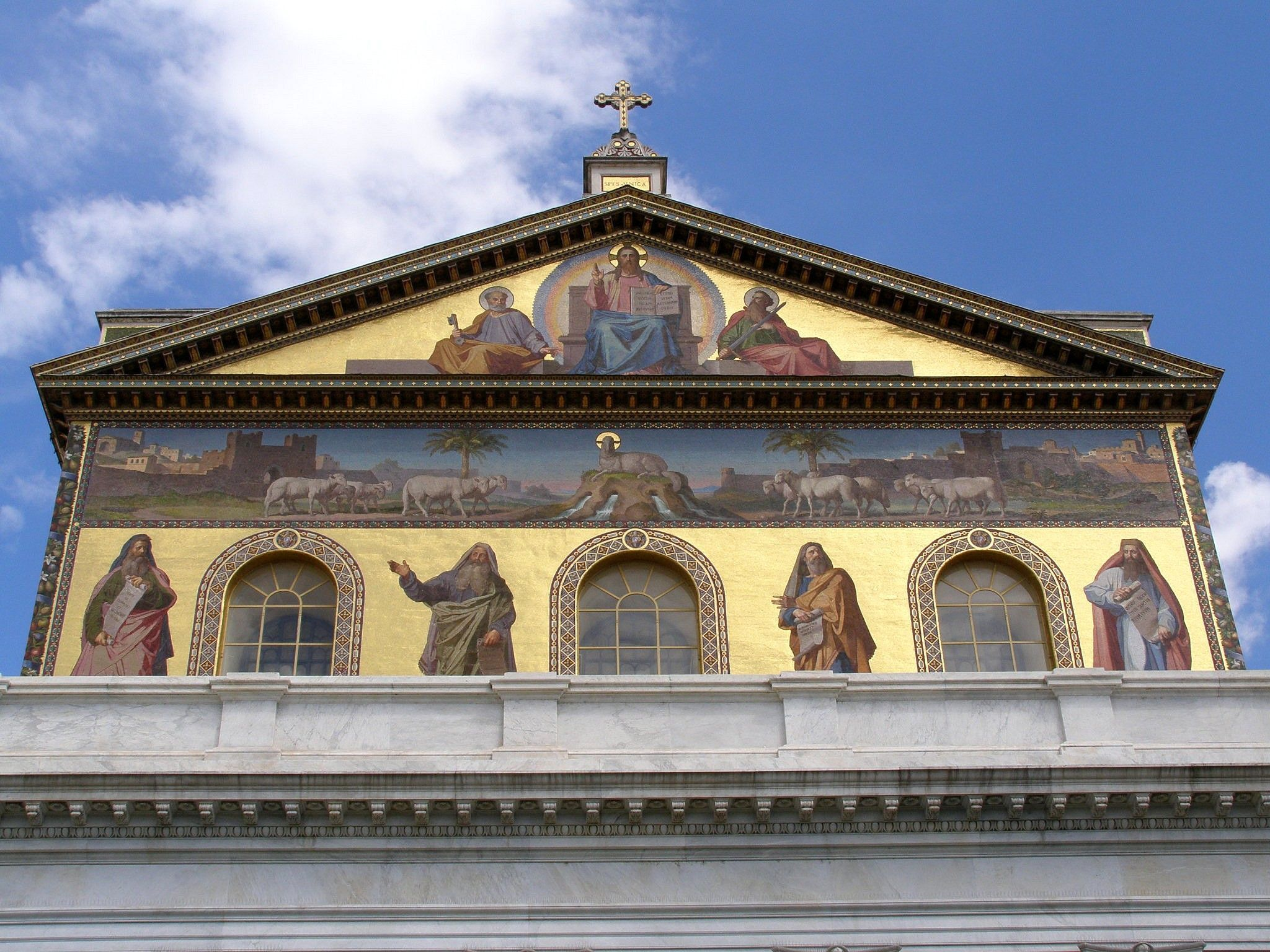 Hlavné priečelie s mozaikami